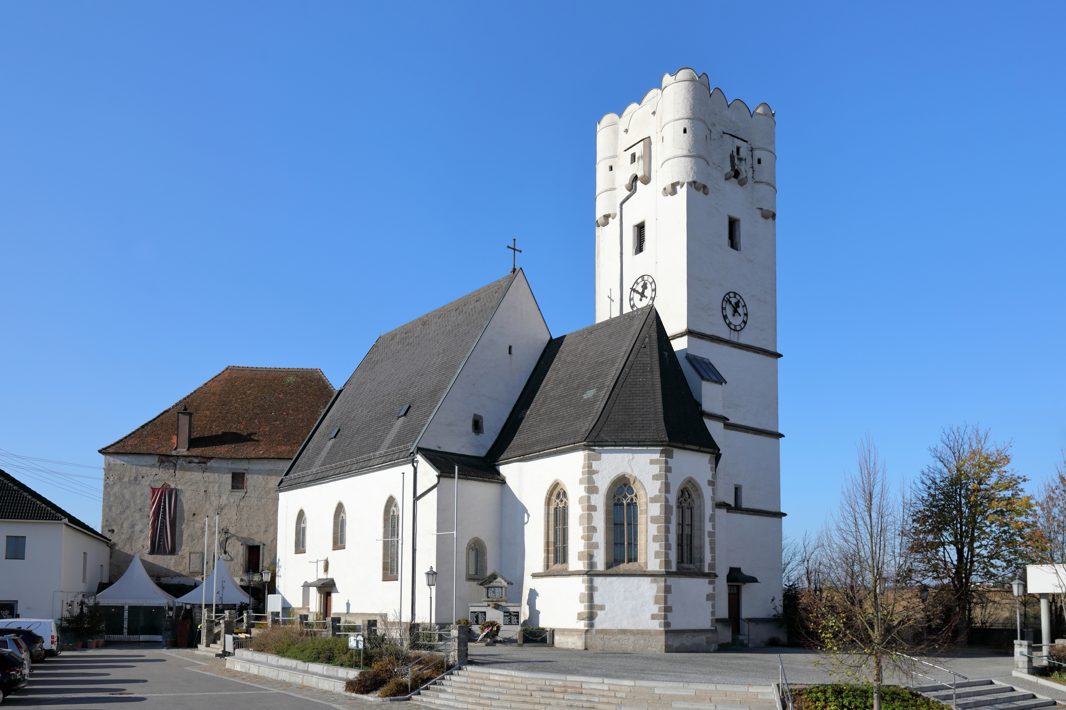 Ostsüdostansicht der röm.-kath. Pfarrkirche hl. Johannes der Täufer in der oberösterreichischen Gemeinde Arbing. Die Pfarrkirche, errichtet Ende des 15. Jahrhunderts, ist ein zweischiffiger Kirchenbau auf dem Schlossberg und mit dem markanten Kirchturm, der ursprünglich ein Wehrturm war, weithin sichtbar.